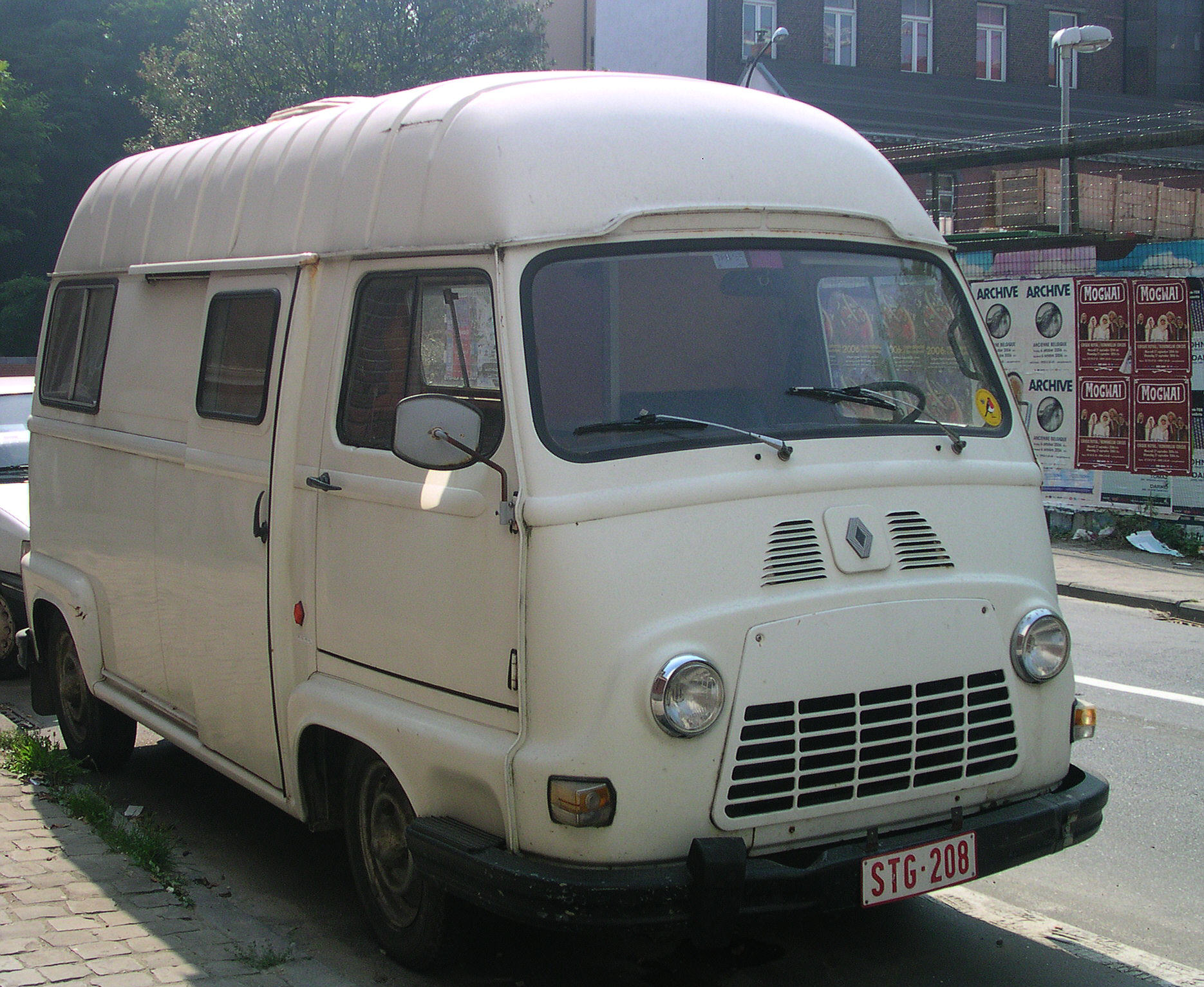 alter Renault Transporter in Brüssel in der Nähe des Europäischen Parlaments